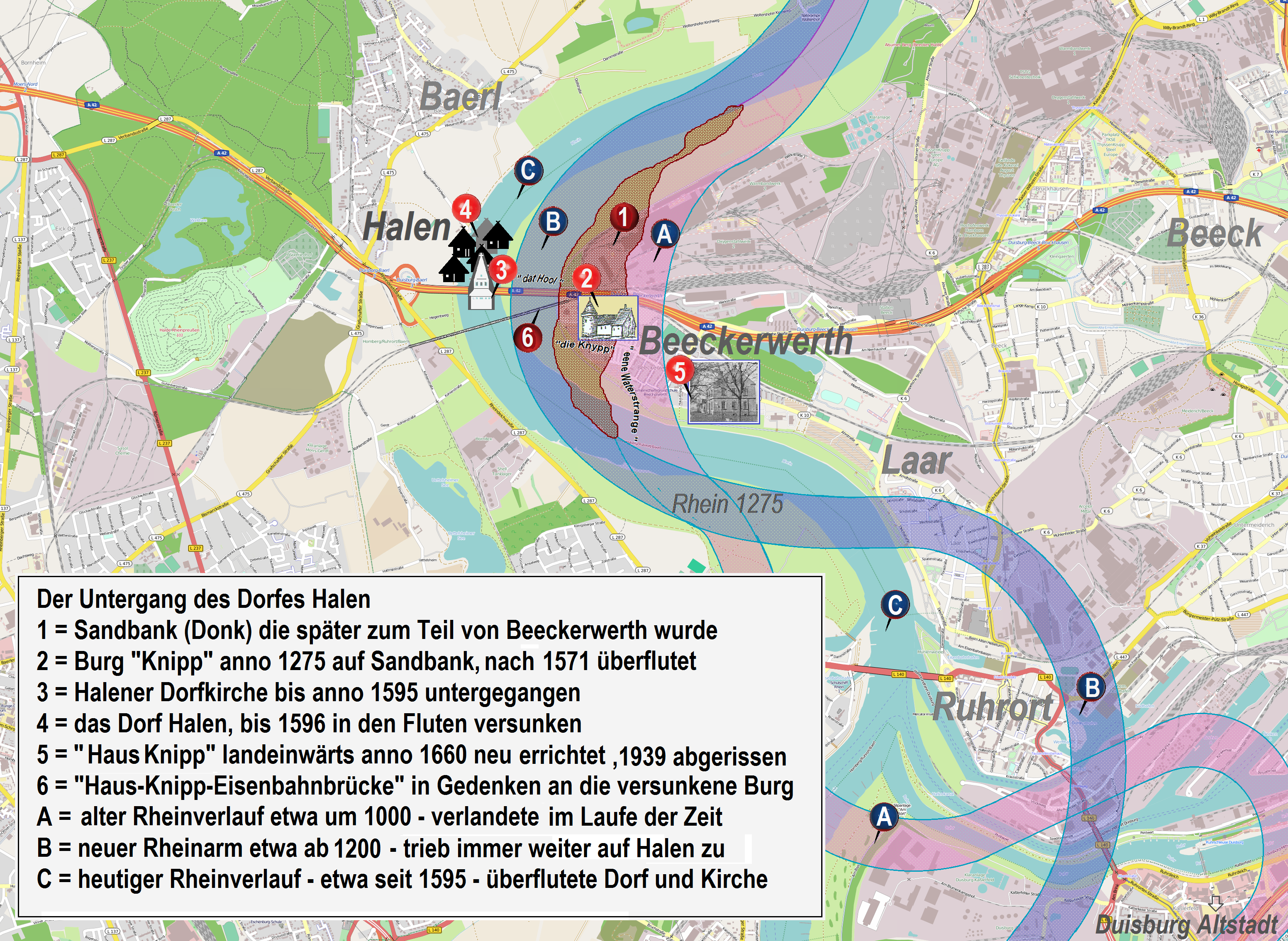 Untergang des Dorfes Halen This map of Halen(Niederrhein) was created from OpenStreetMap project data, collected by the community. This map may be incomplete, and may contain errors. Don't rely solely on it for navigation.